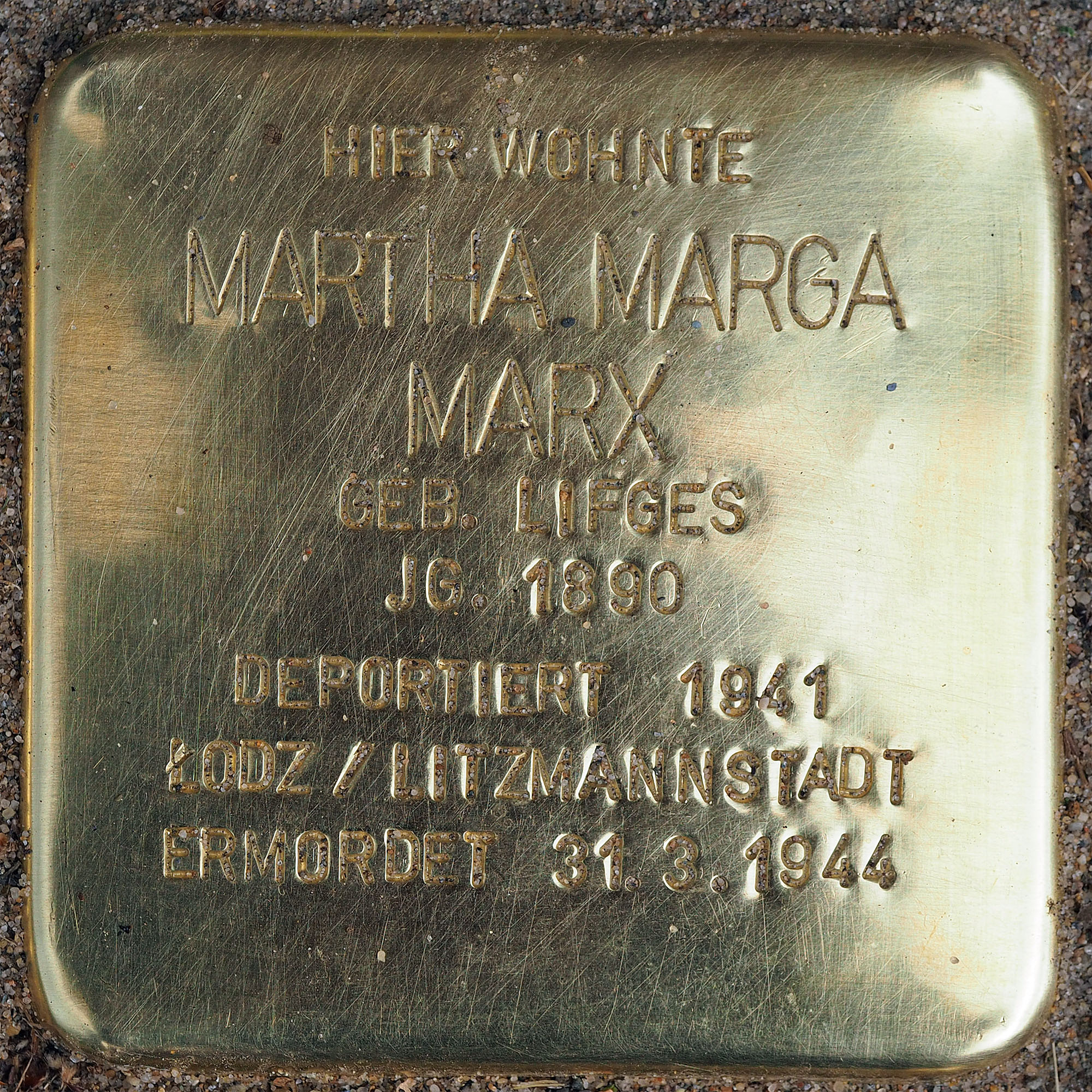 Stolpersteine Suechteln: Marx, Martha Marga